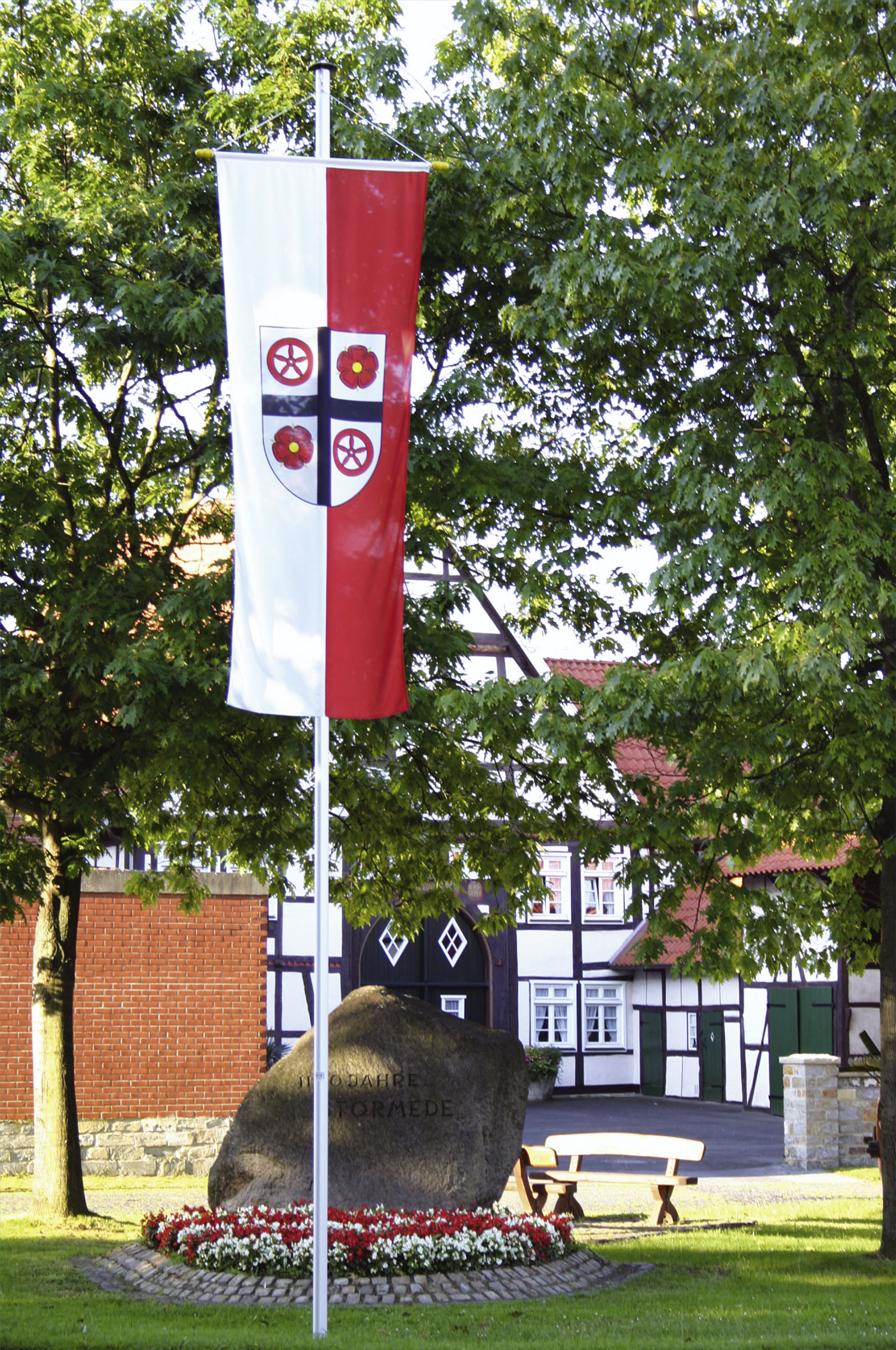 Geseke: Das älteste Haus (Fachwerkhaus) mit Leiterwagen und Schützenfahne in Störmede